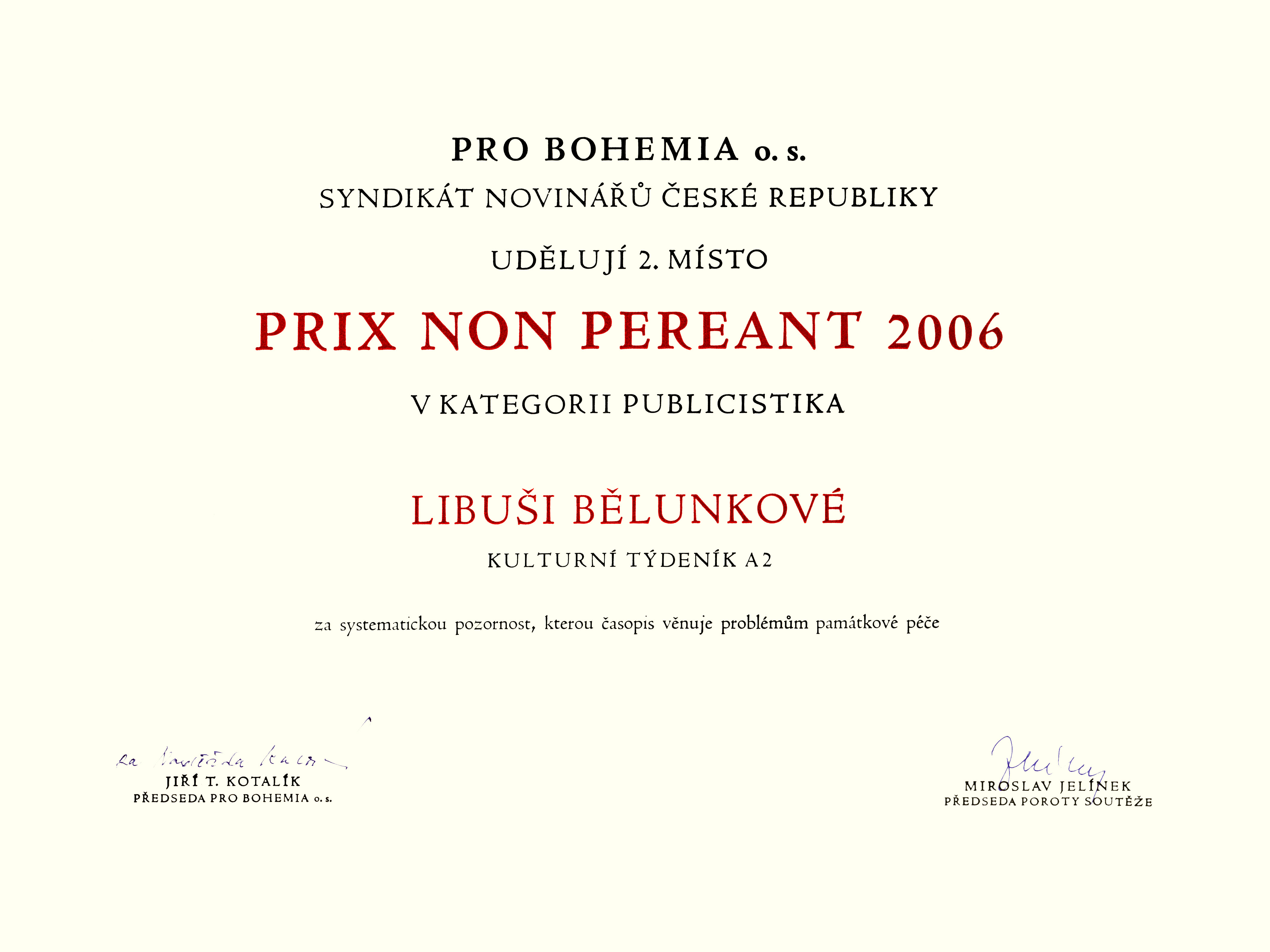 Ocenění Média na pomoc památkám udělené A2 kulturnímu týdeníku